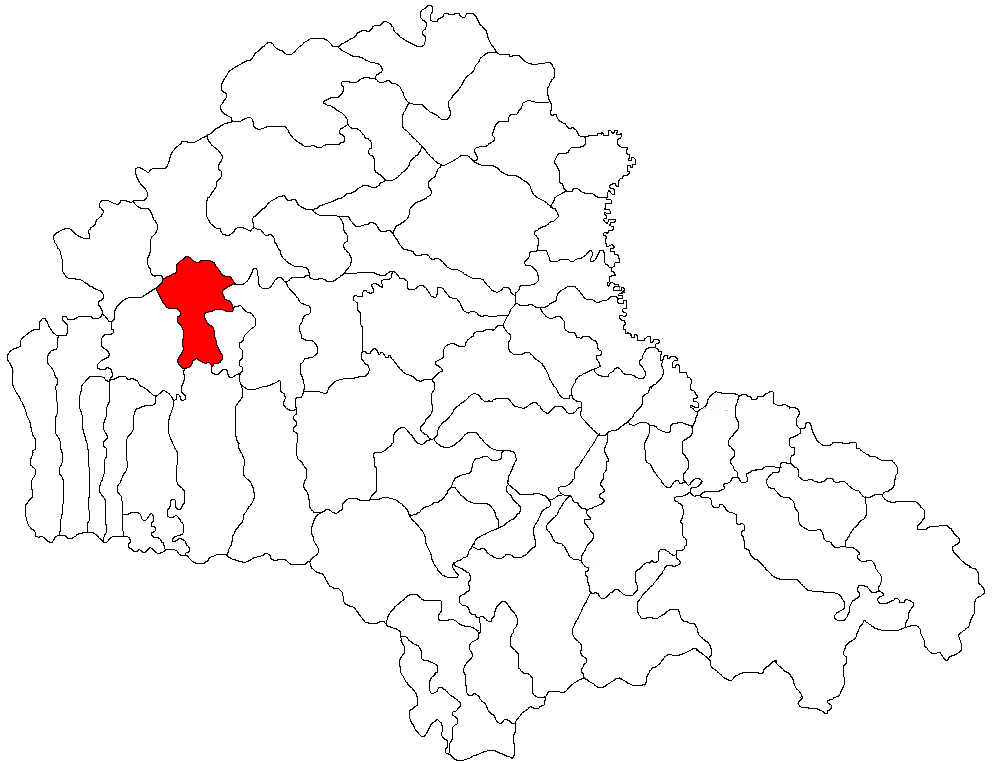 Categorie:Hărţi ale judeţului Braşov